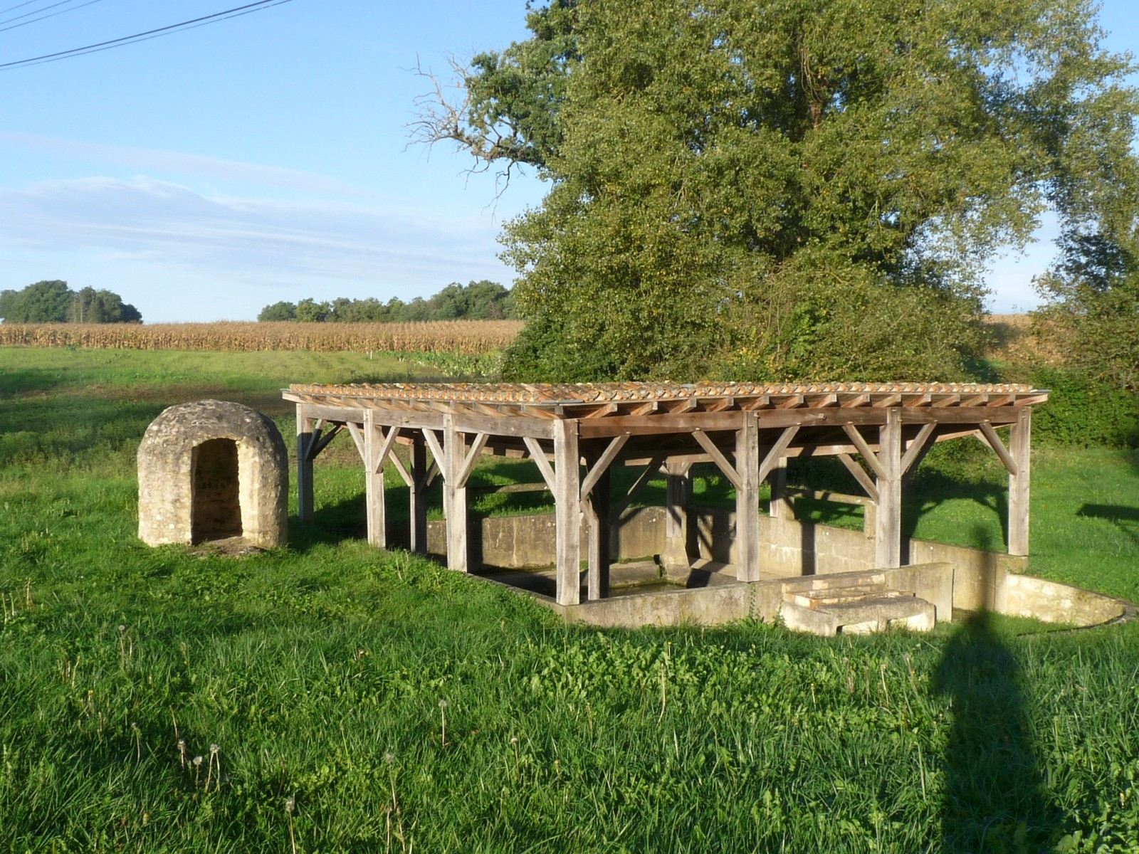 Lavoir sur la route de Chatenet et de Polignac, Jussas, Charente-Maritime, France